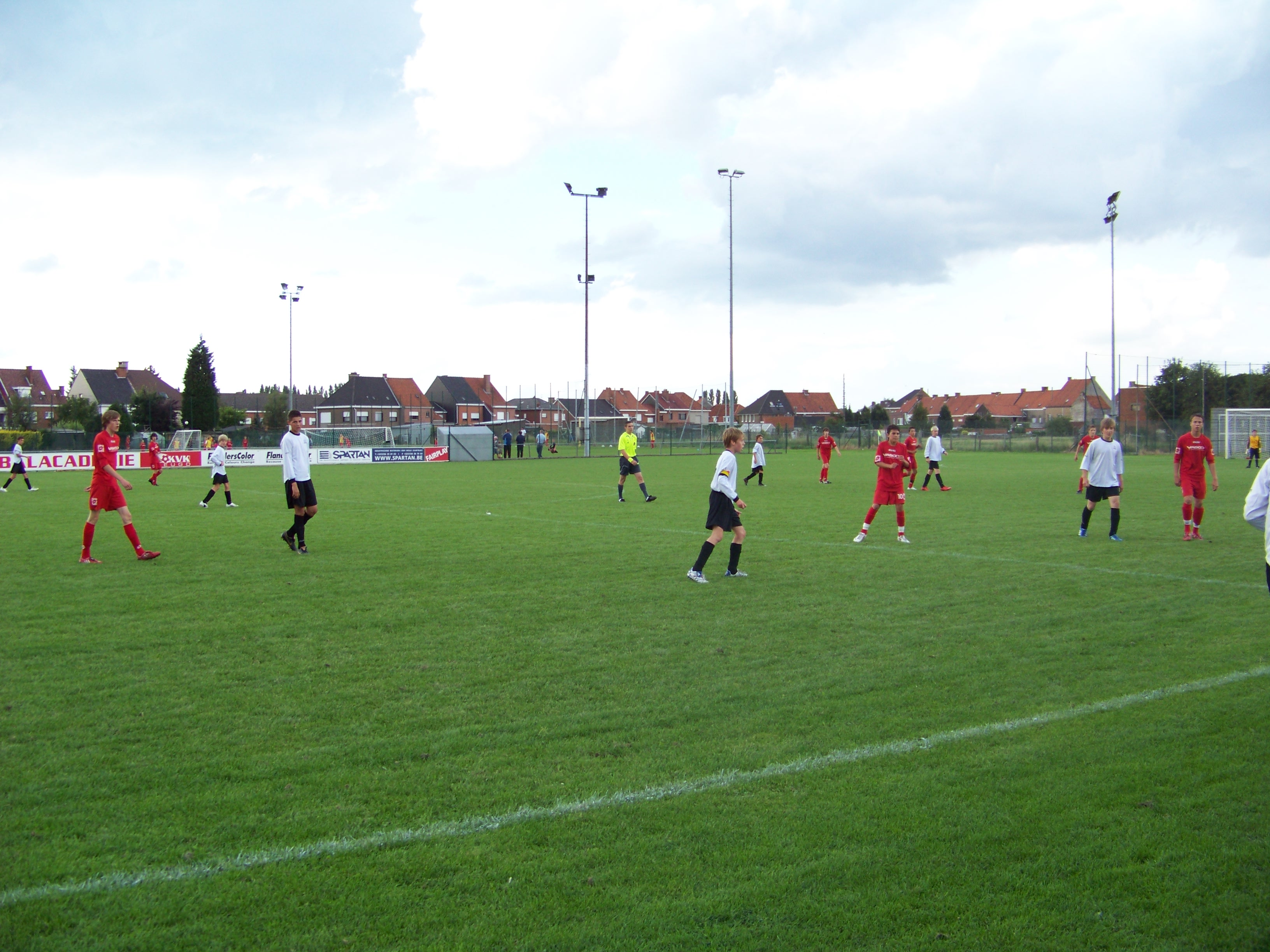 Wedstrijd op het tweede jeugdterrein van KV Kortrijk